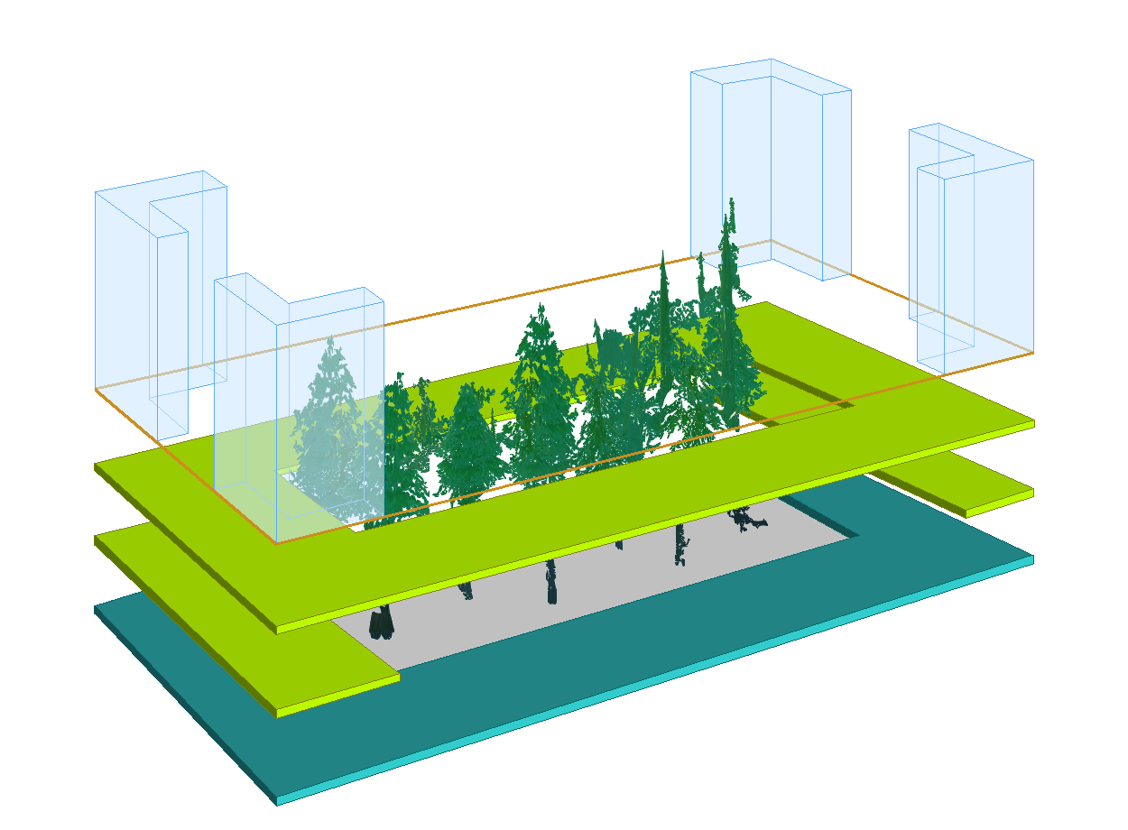 Bibliothèque nationale de France Site Tolbiac